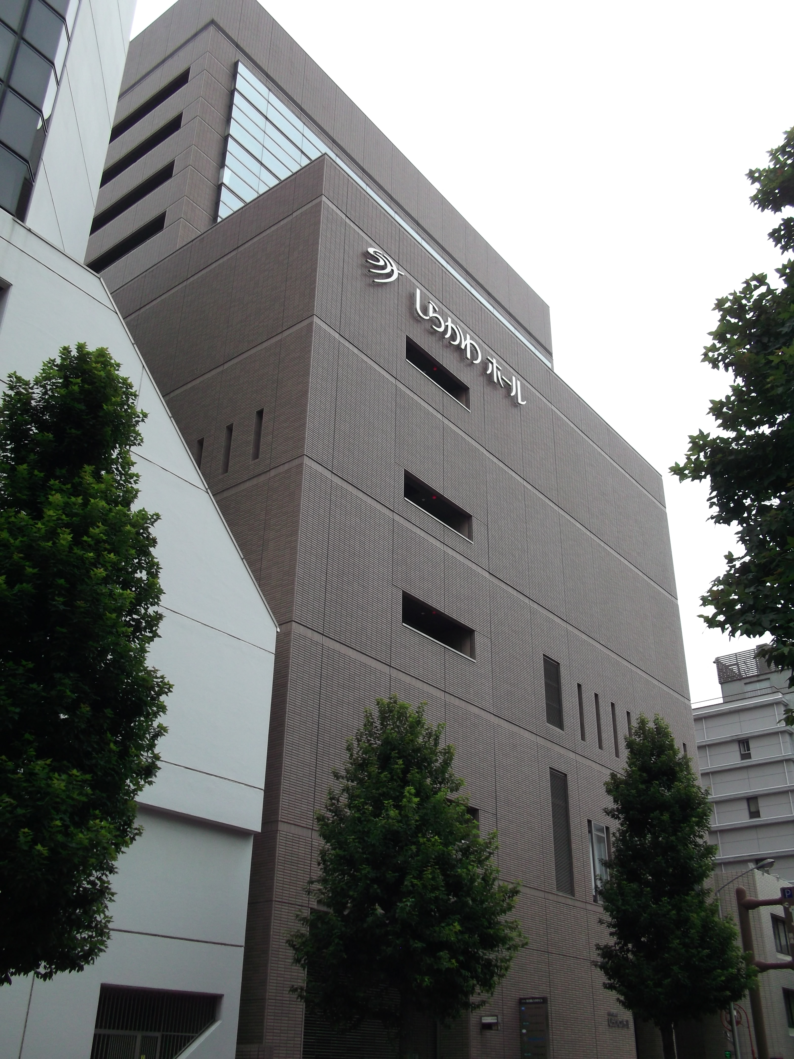 名古屋市中区のしらかわホールを南側公道西側より撮影